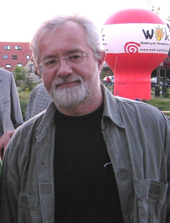 Henryk Sawka (ur. 9 lutego 1958 roku w Gryfinie) - polski rysownik, satyryk i ilustrator.